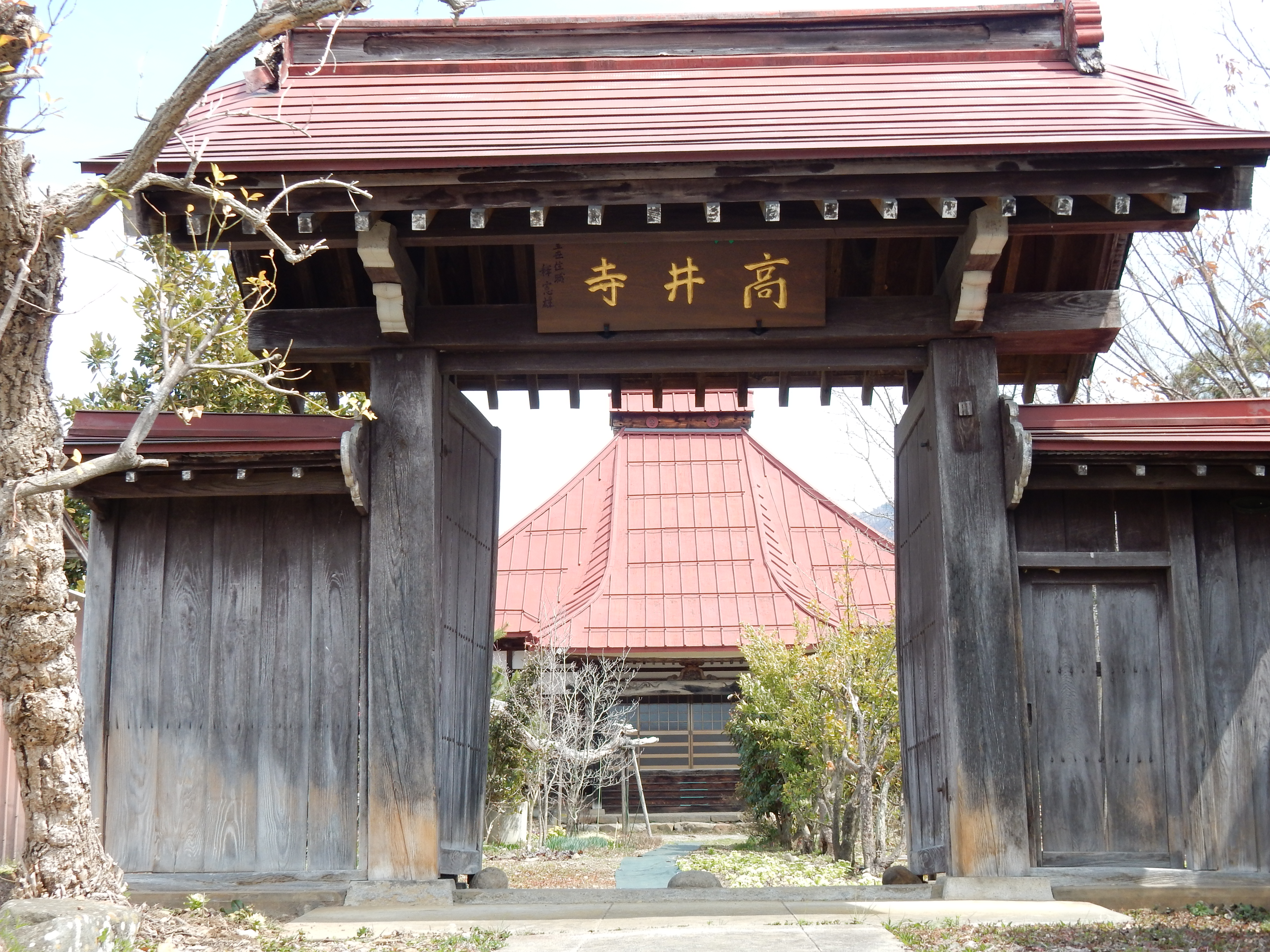 長野県高山村の福島正則改易後住居跡、高井寺(こうせいじ)山門